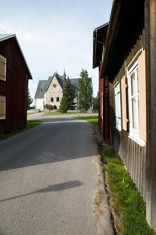 Öjebyns kyrka från kyrkstaden. Motiv: Öjebyn Nyckelord: Riksintressen Kategori: Kyrkstad Öjebyns kyrka från kyrkstaden.